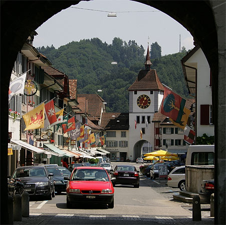 Hauptgasse und Untertor in Willisau